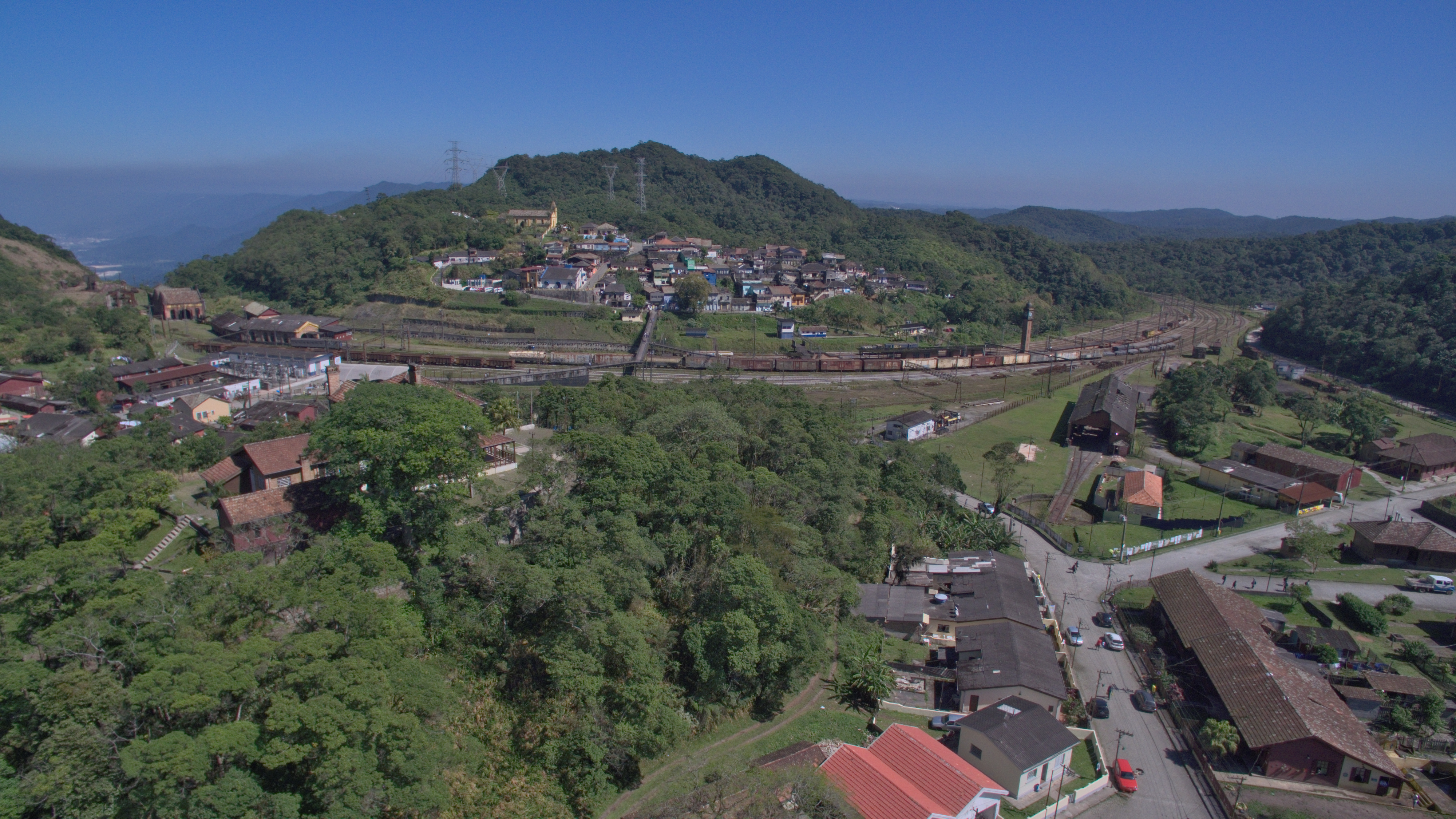 Vila Ferroviária de Paranapiacaba